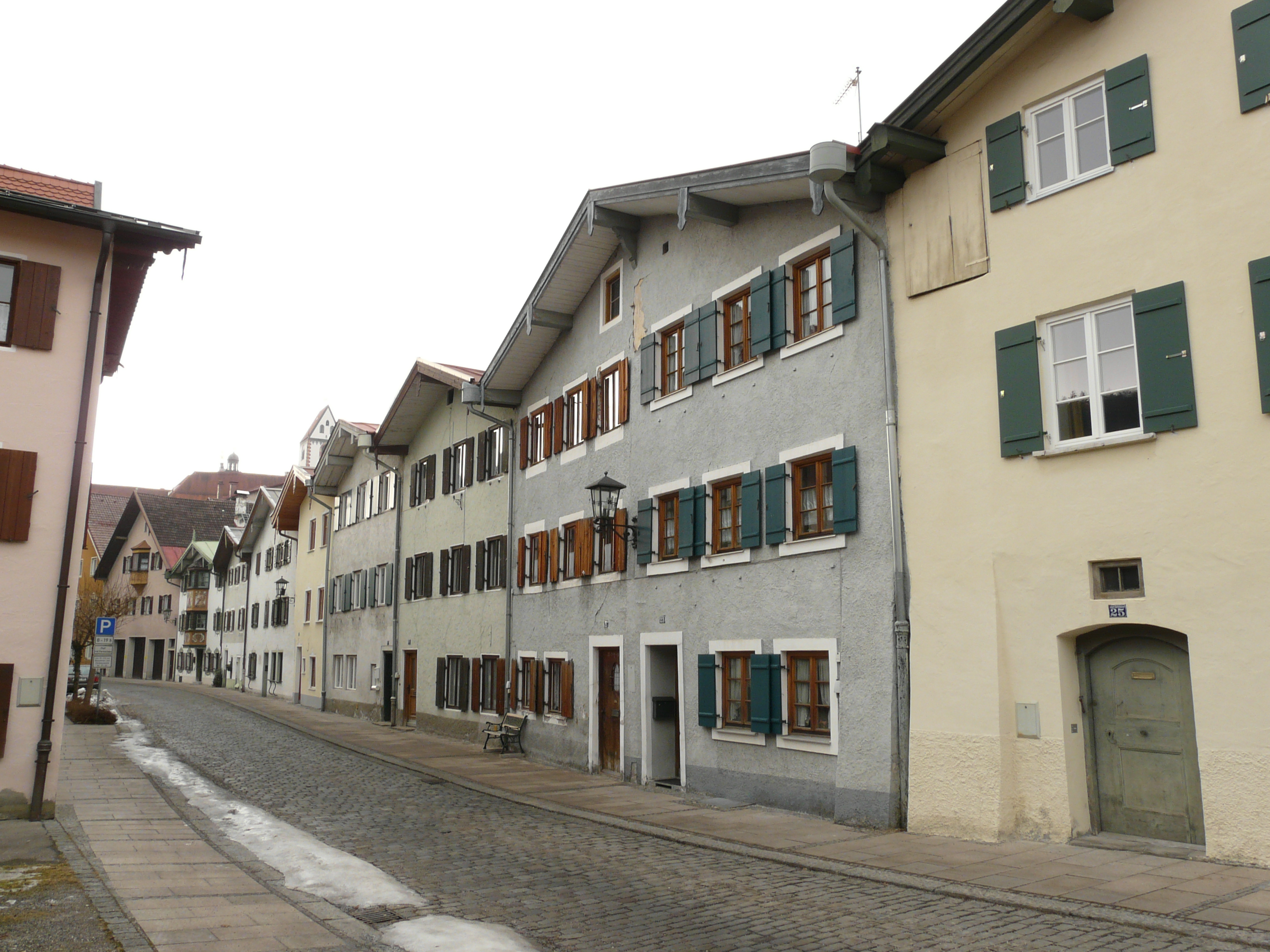 Spitalgasse 21 und 23 in Füssen